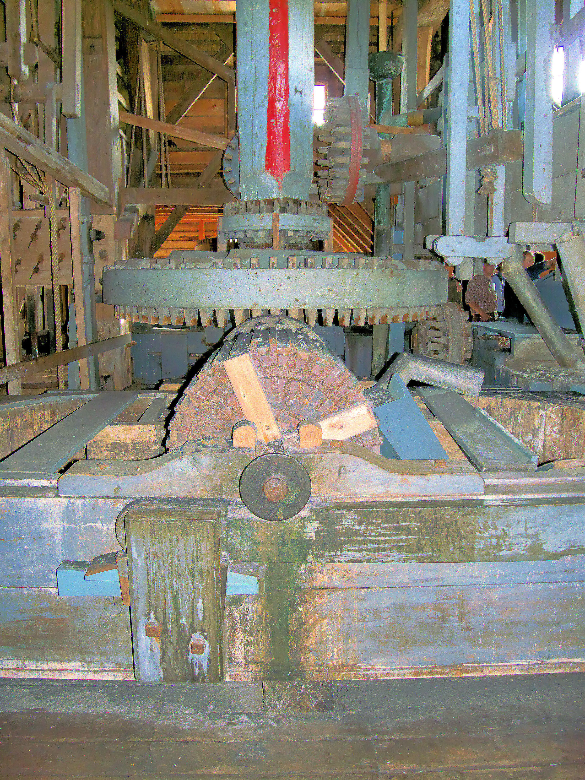 De Schoolmeester onderwiel, groot wentelwiel, wentelwiel kantstenen en maalbak